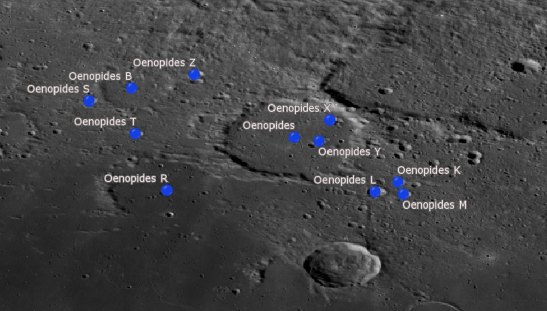 Cráter lunar Oenopides. Cráteres satélite. (Imagen LRO)